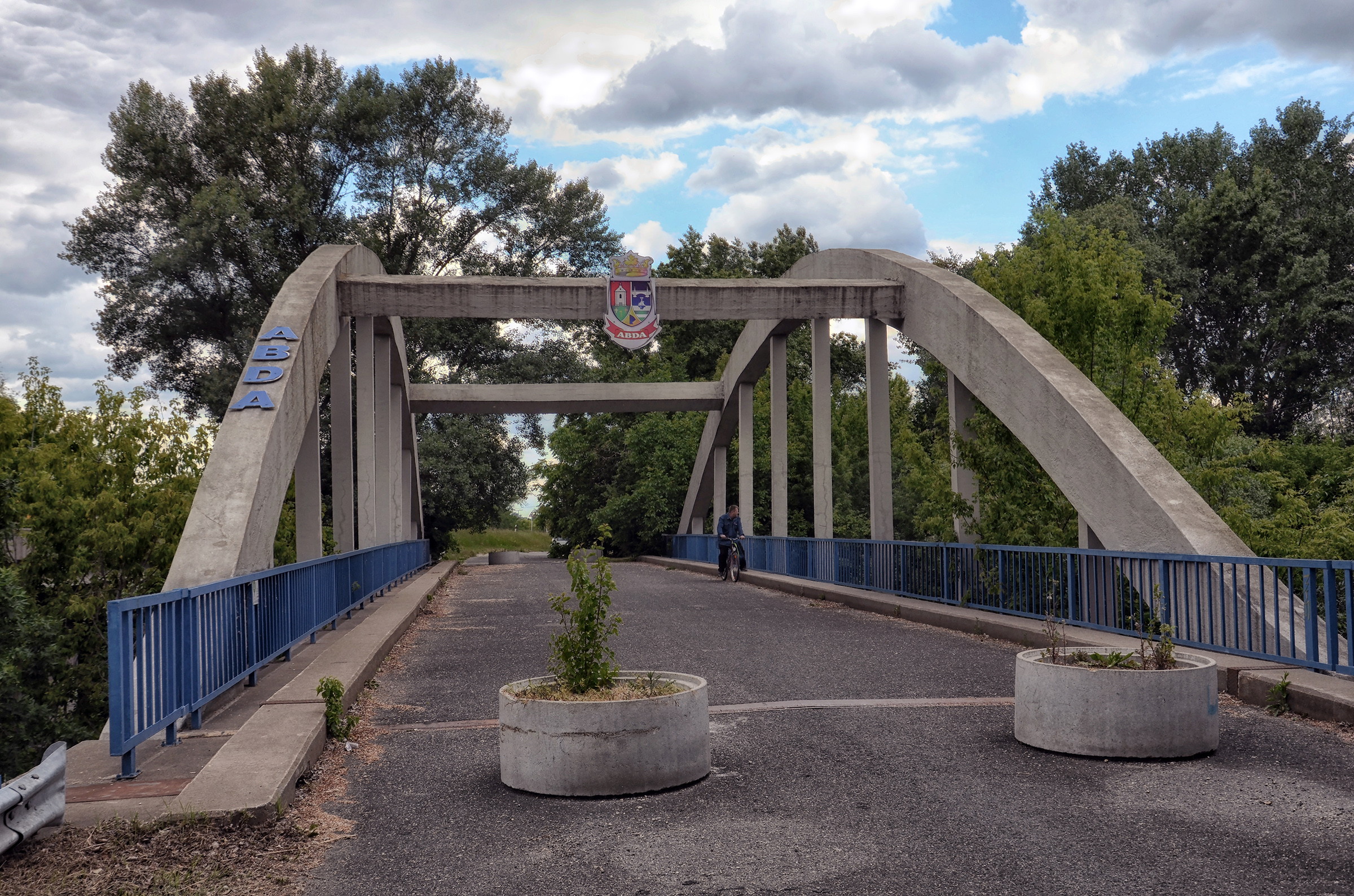 A Rábcát átívelő régi közúti betonhíd Abdánál